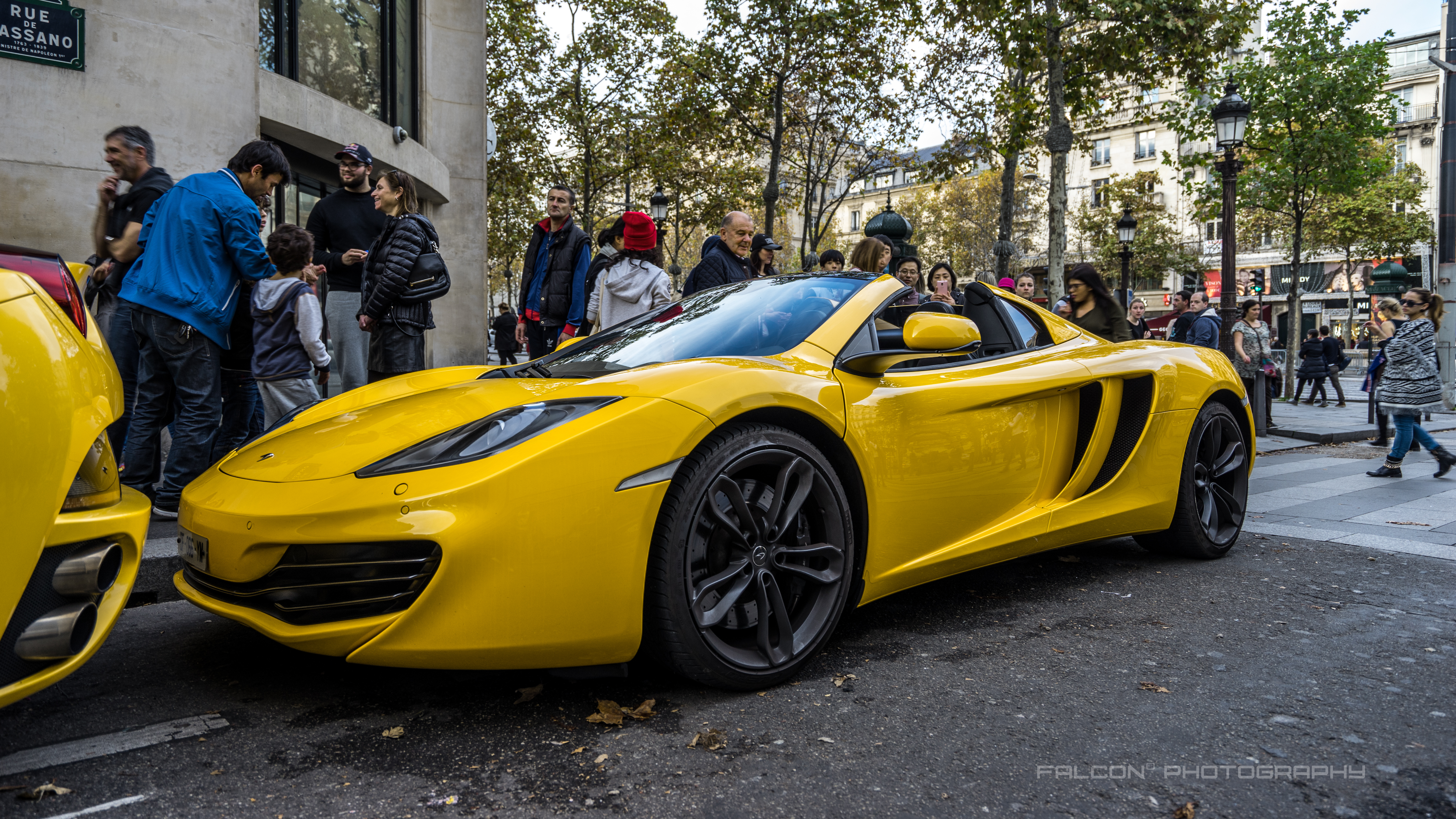 McLaren 12C Spider